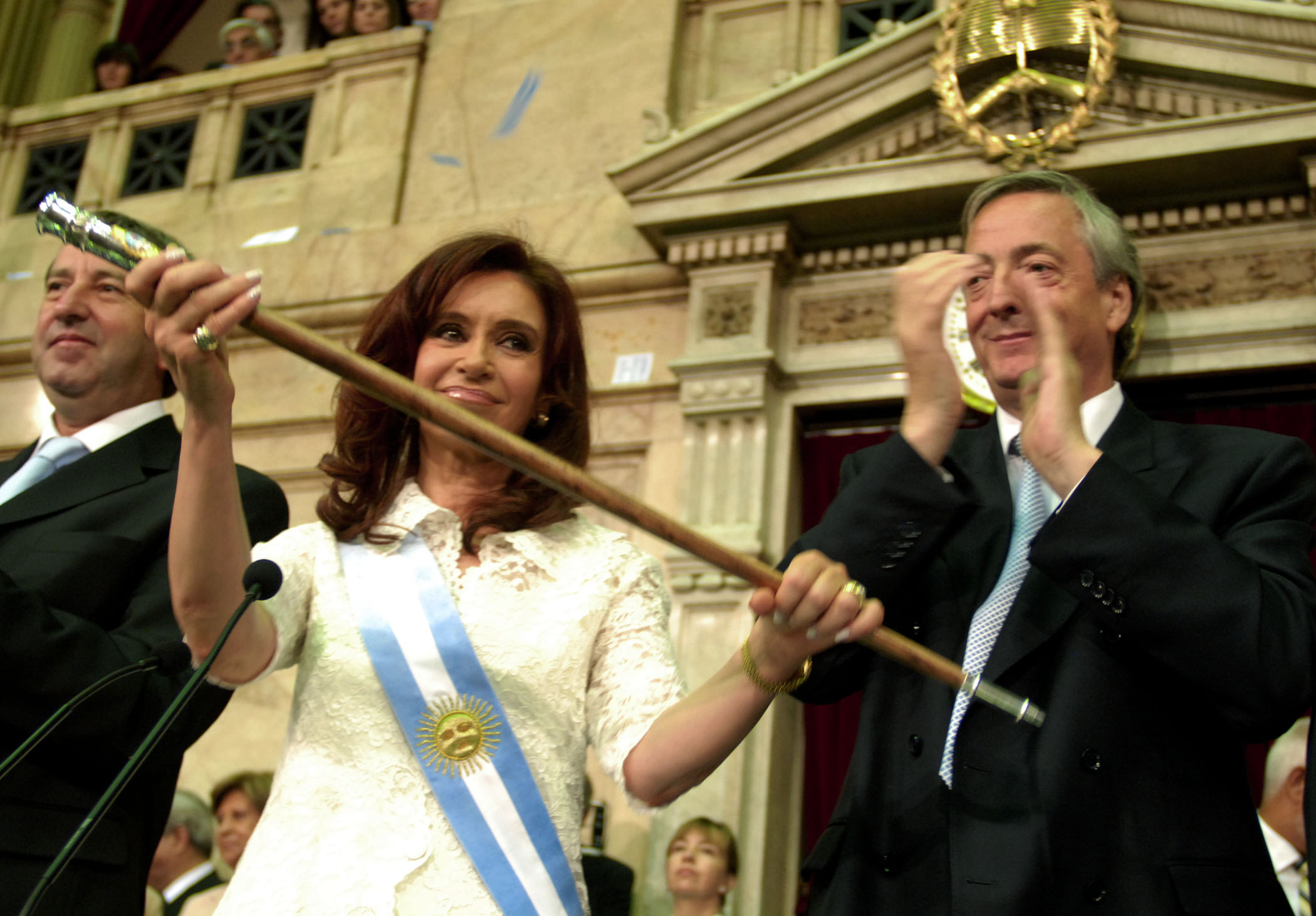 Cristina Fernández con el bastón presidencial.